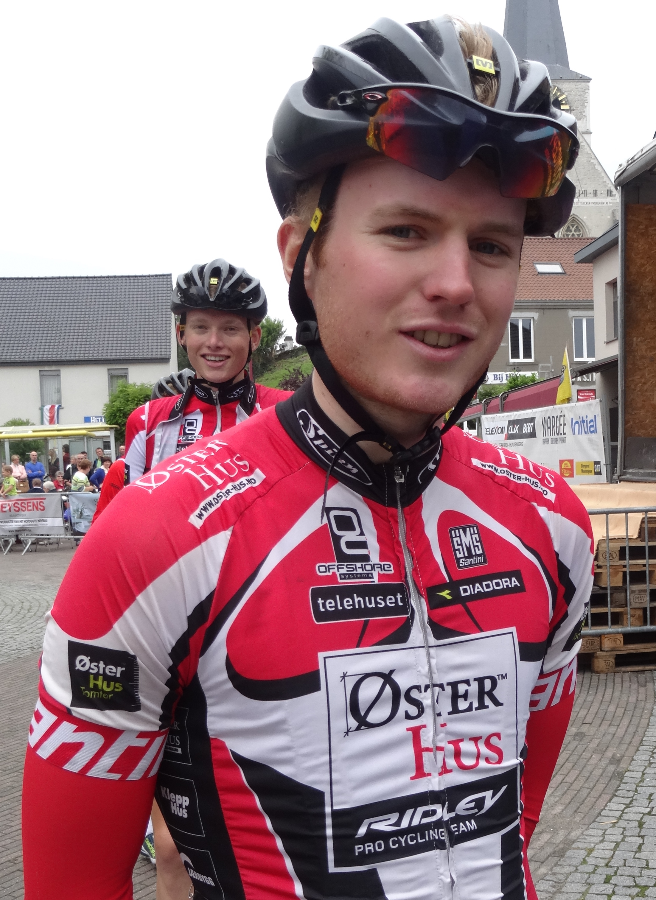 Reportage photographique réalisé le mercredi 27 août à l'occasion du départ de la Druivenkoers Overijse 2014 à Huldenberg, Belgique.